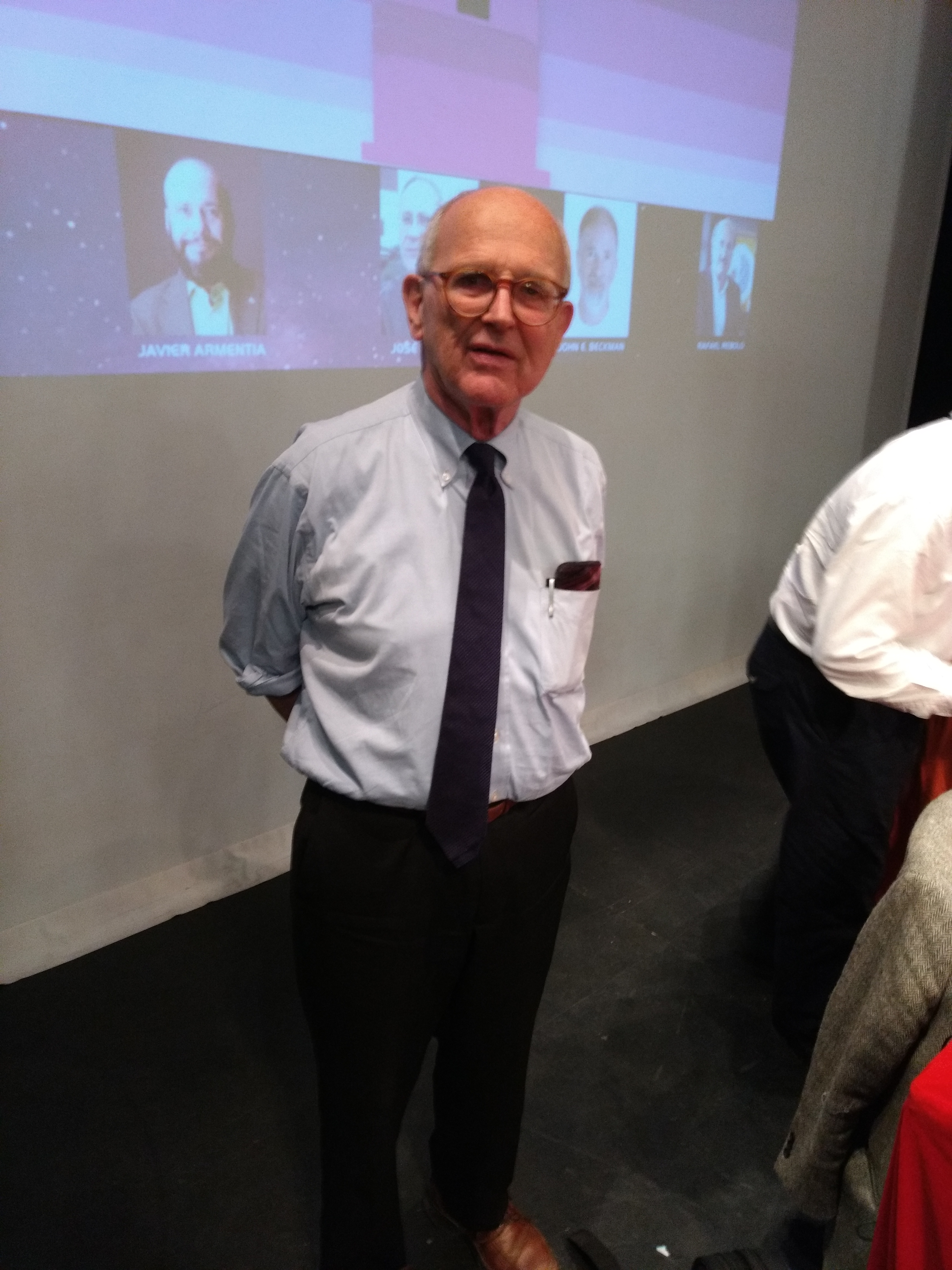 El profesor Rainer Weiss tras impartir una conferencia en el teatro Apolo de la ciudad de Almería (España), 4 de junio de 2018.